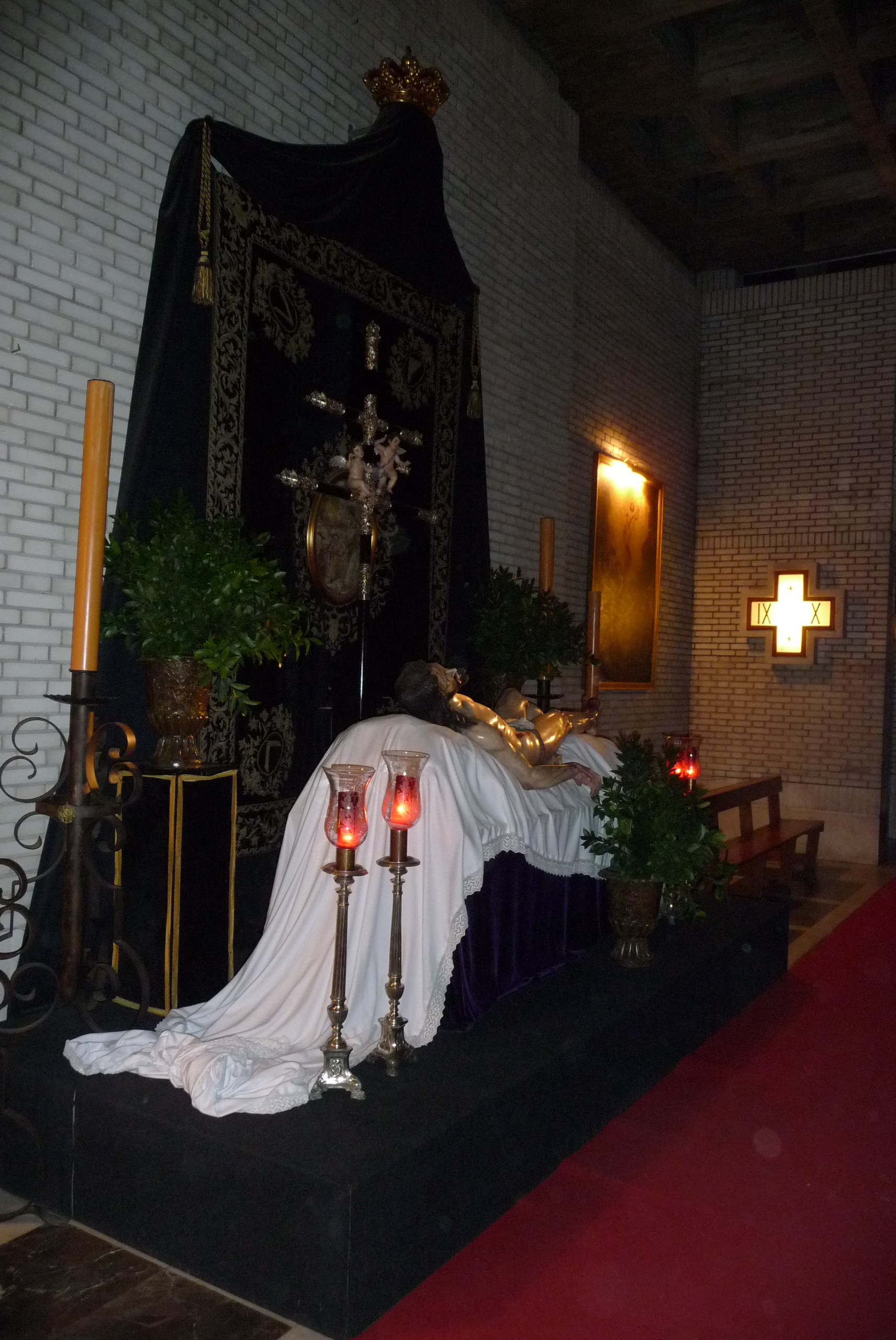 Nuestro Padre Jesús en su Sagrada Mortaja (Jerez de la Frontera)